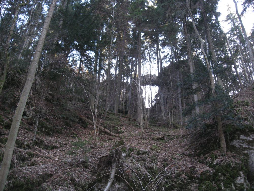 Čertův most v Moravském krasu z cesty v Suchém žlebě. Pohled mimo vegetační období.